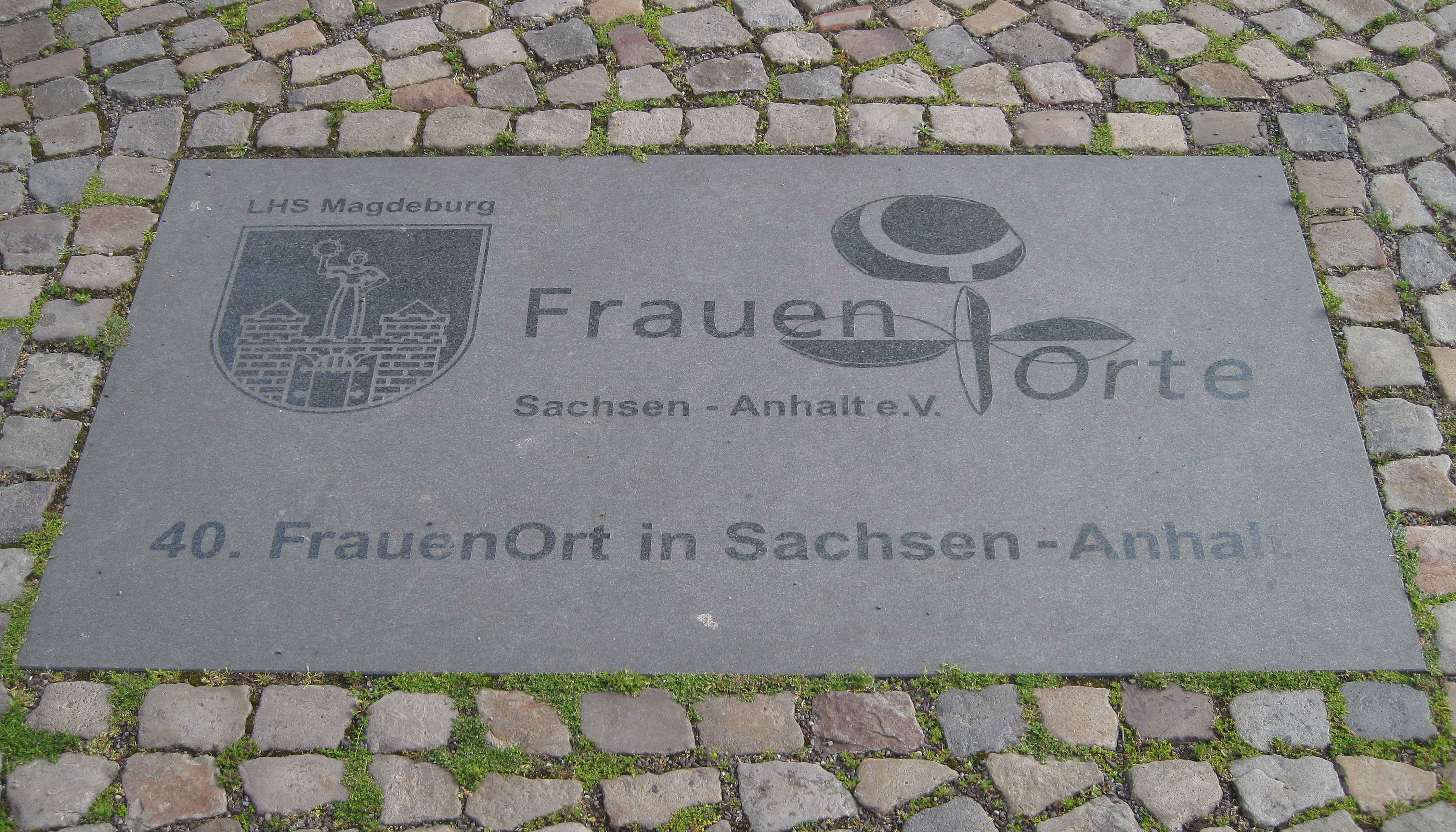 40. FrauenOrt (Ottonenfrauen) in Sachsen-Anhalt in Magdeburg, am Fürstenwall (Höhe Dom), südwestlich von Fürstenwall 3.